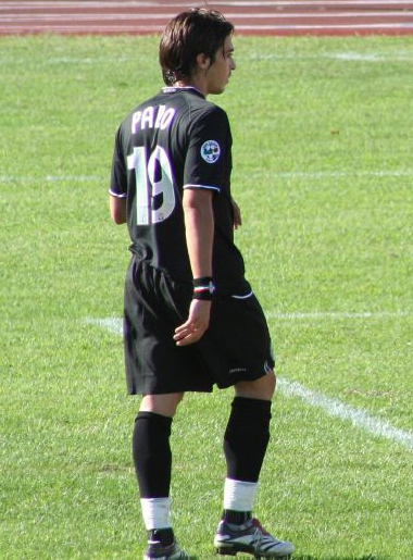 Matteo Paro durante la partita Rimini-Juventus, prima giornata di serie B 2006/07